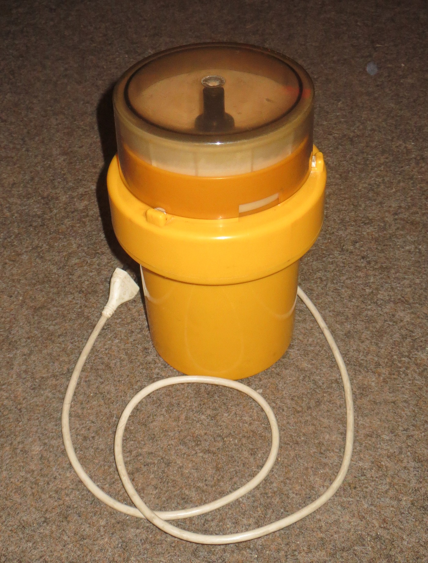 Lebensmittelzerkleinerer Multiboy LZ 251 aus DDR-Produktion